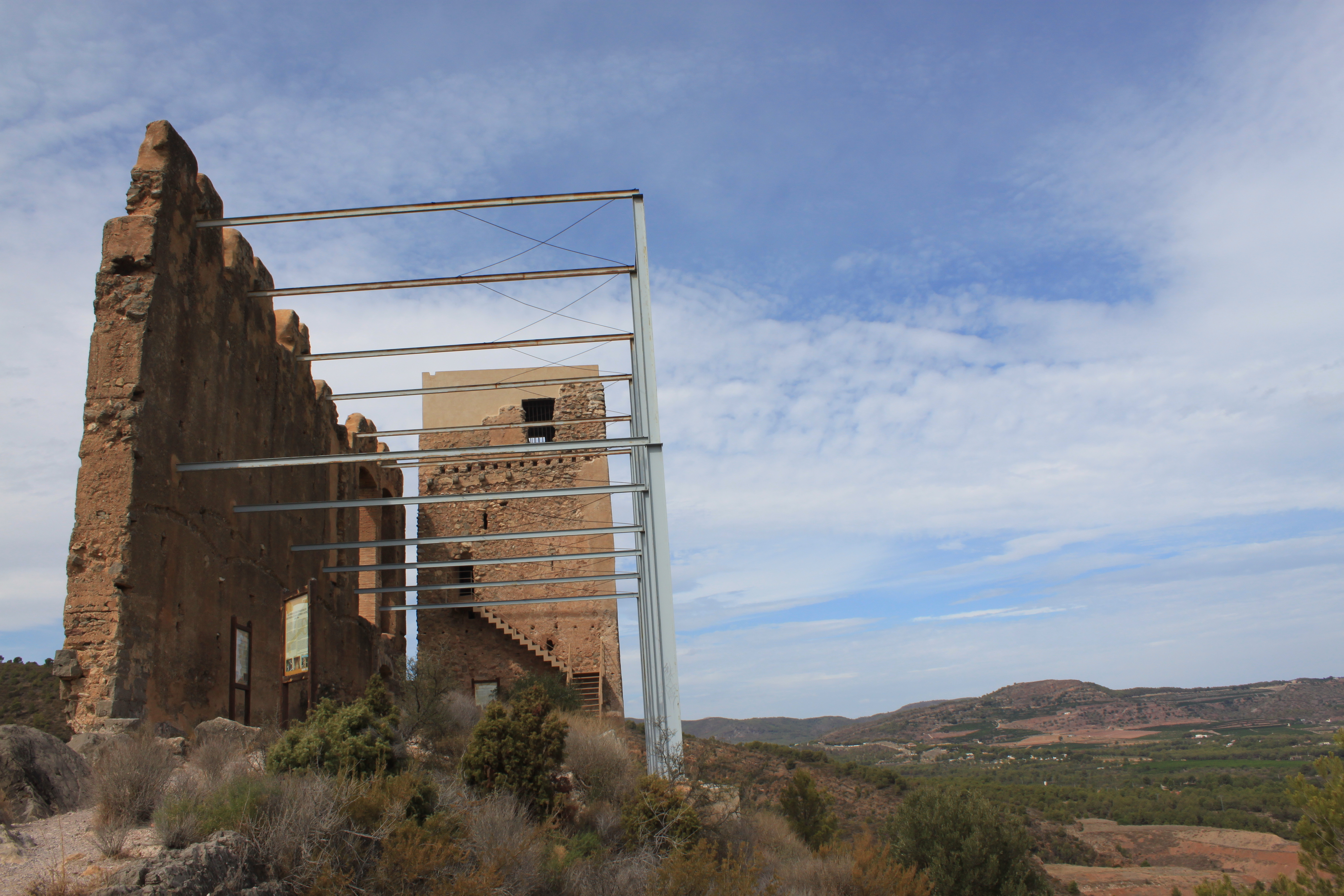 Castillo de Beselga. Vista de la estructura de refuerzo tras la restauración de 2004. Beselga, Estivella, provincia de Valencia, Comunidad Valenciana, España.